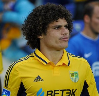 Марсіо Азеведо - бразильський футболіст під час виступів за ФК Металіст